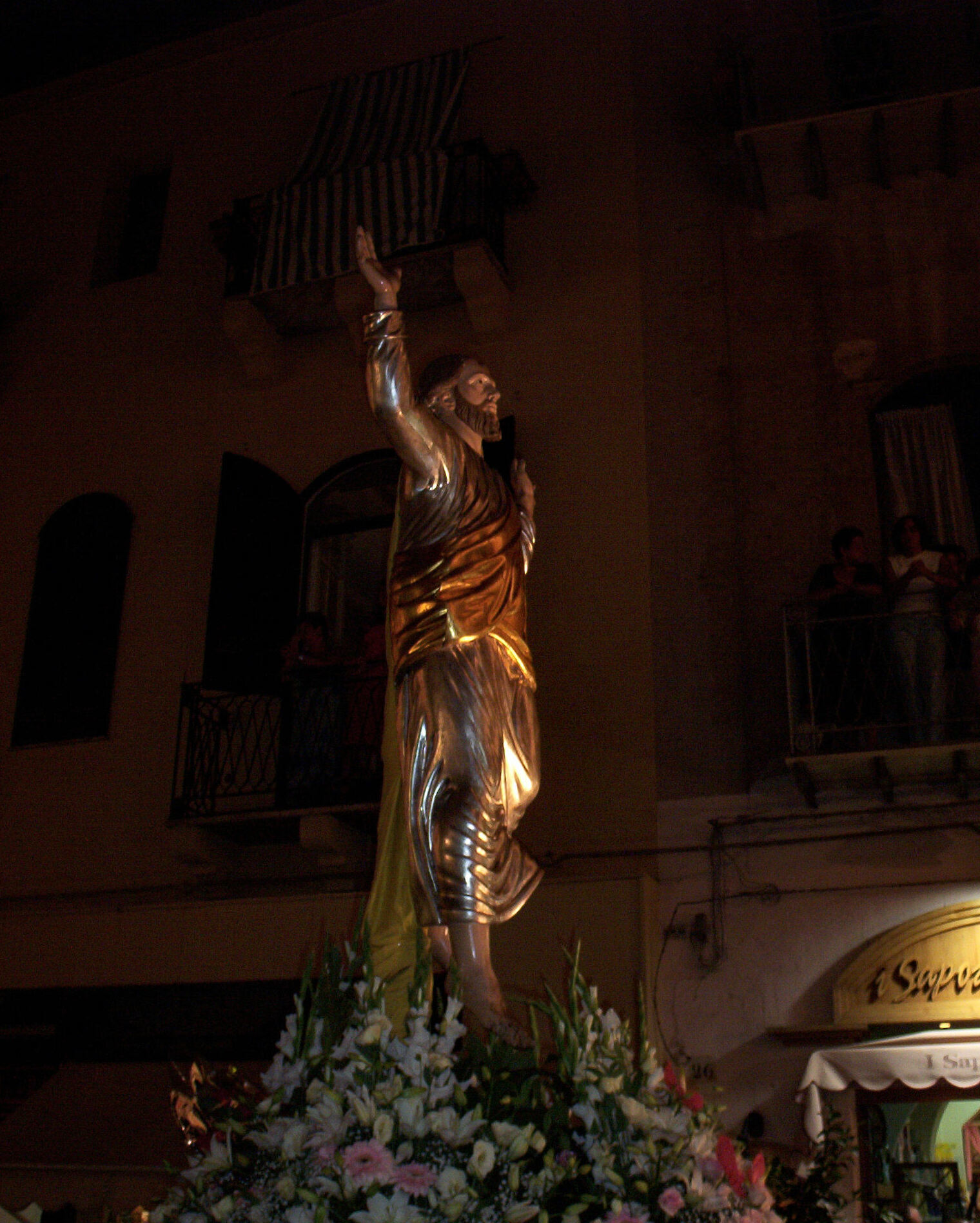 Foto della processione della Festa del Santissimo Salvatore della Trasfigurazione